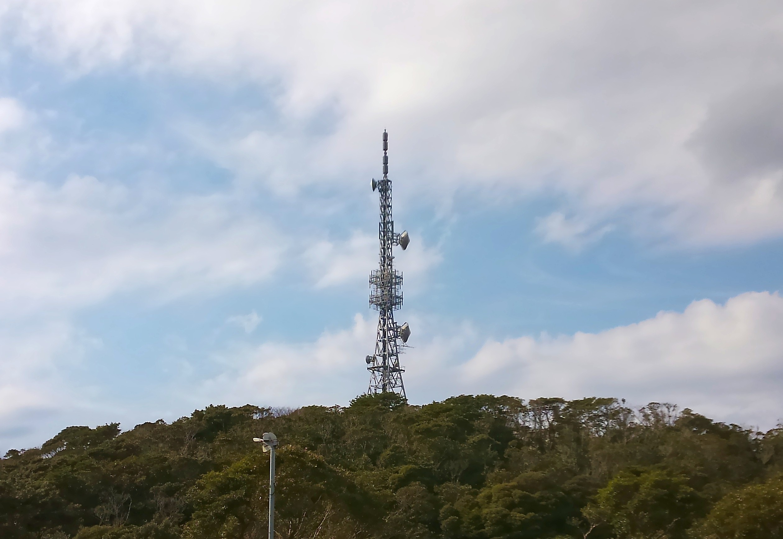 種子島中継局